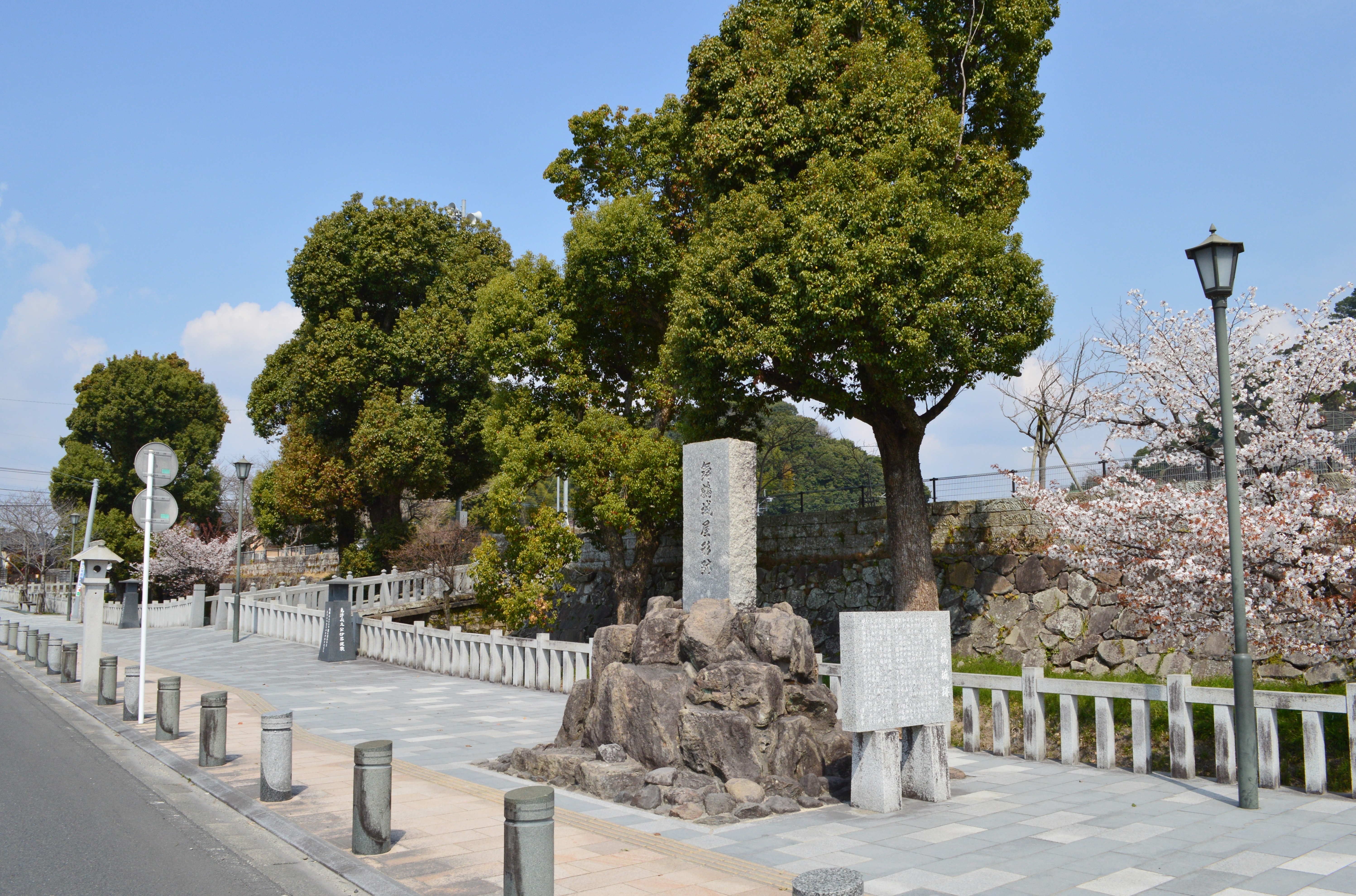 国分城 (大隅国) 概観